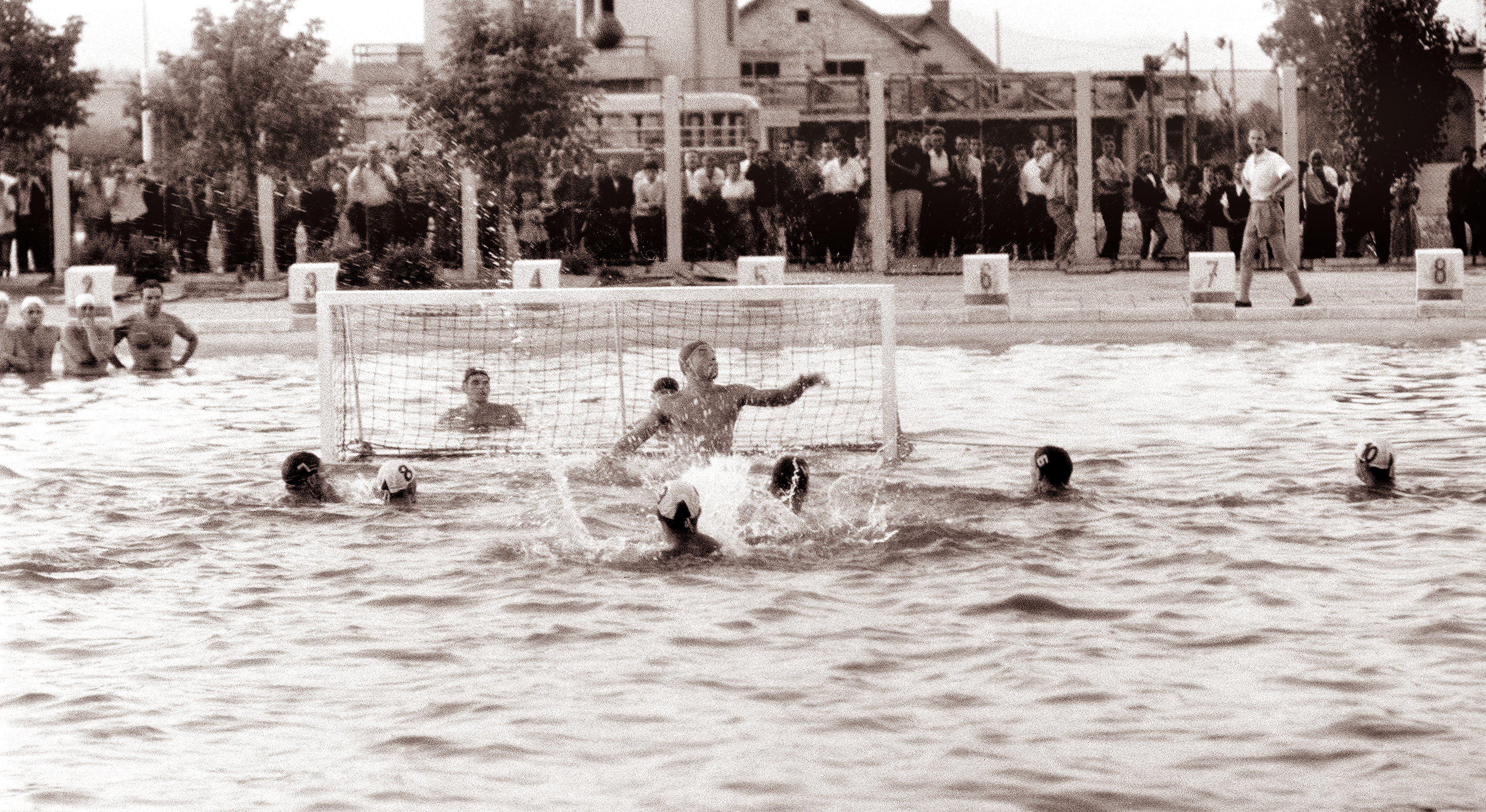 Jugoslovanska reprezentanca v vaterpolu v Celju proti Sovjetski zvezi